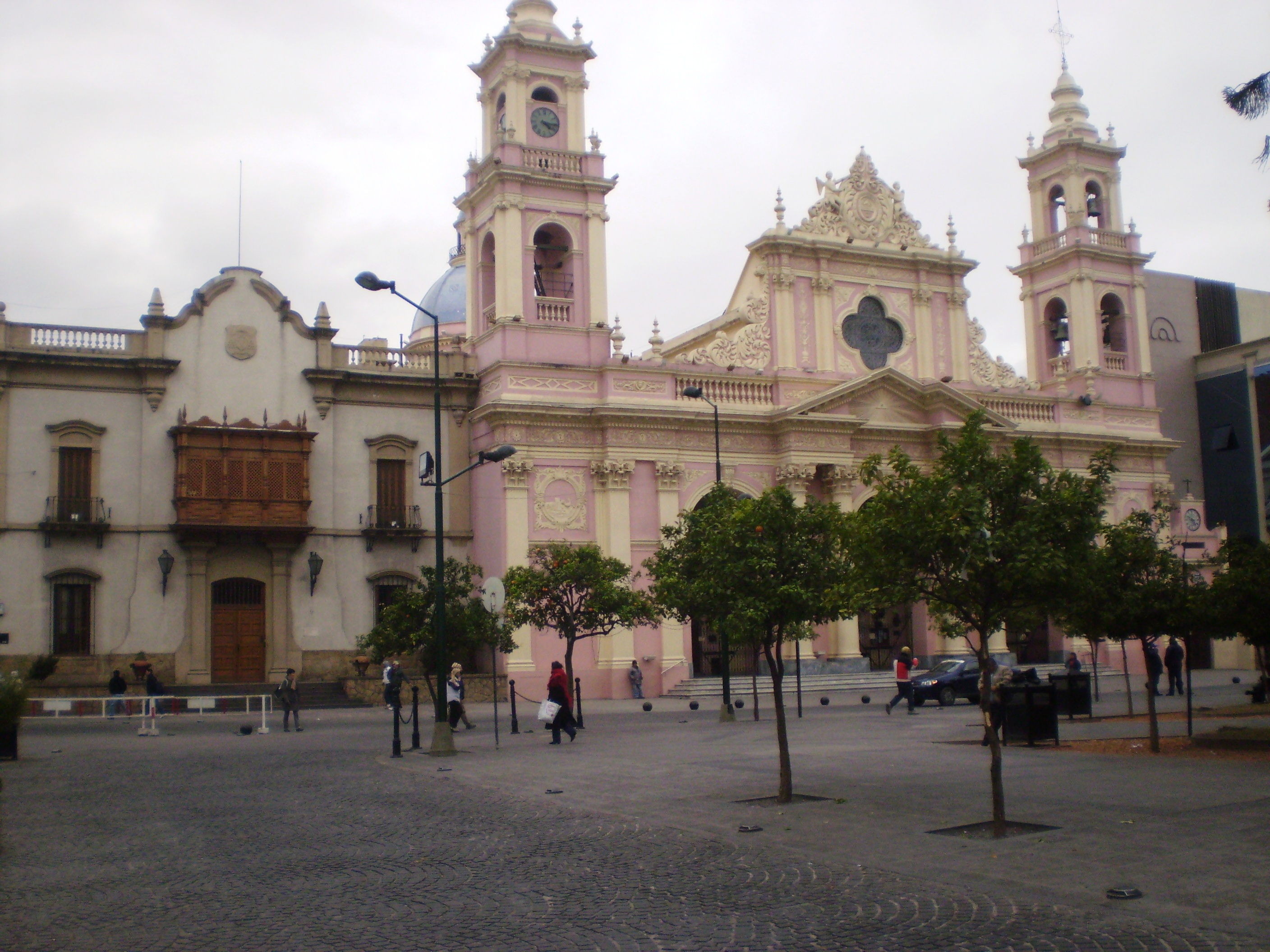 Fachada de la catedral de Salta, Argentina